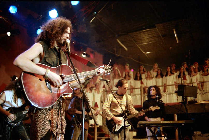 חיים צינוביץ ולהקתו